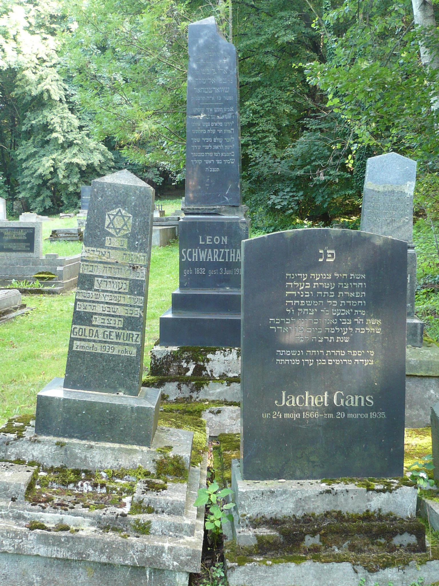 Przemyśl, nowy cmentarz żydowski